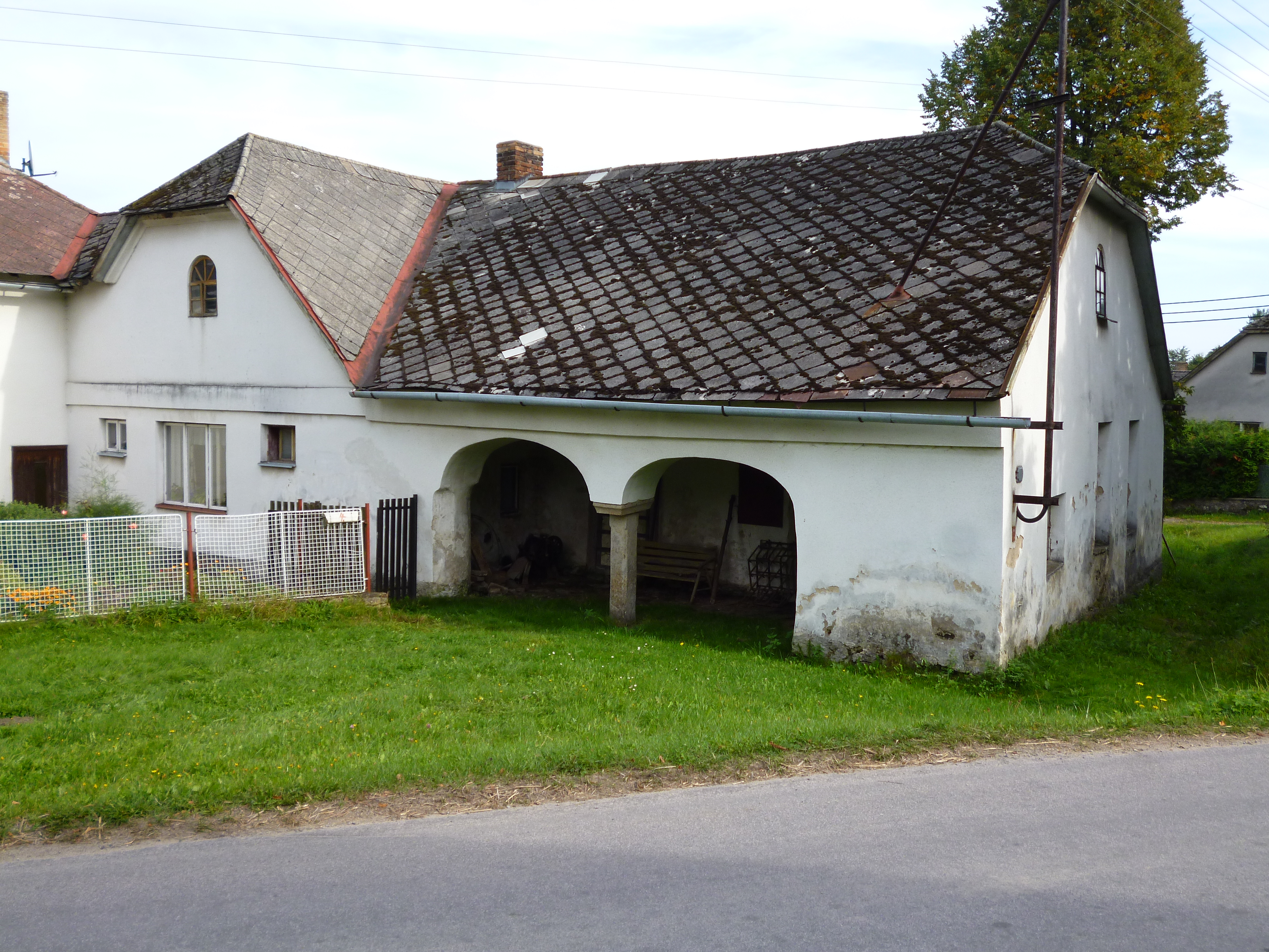 Zbilidy kovárna